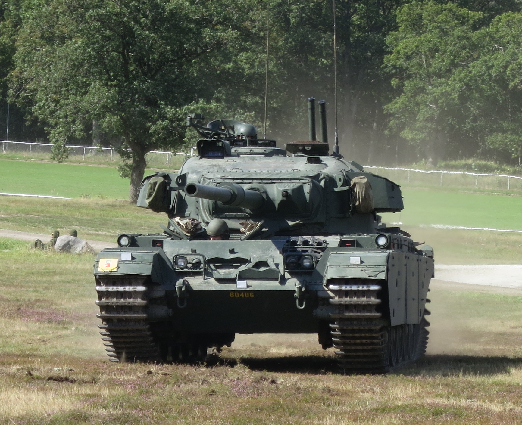 Stridsvagn 102 vid Regementets Dag på P7 Revingehed